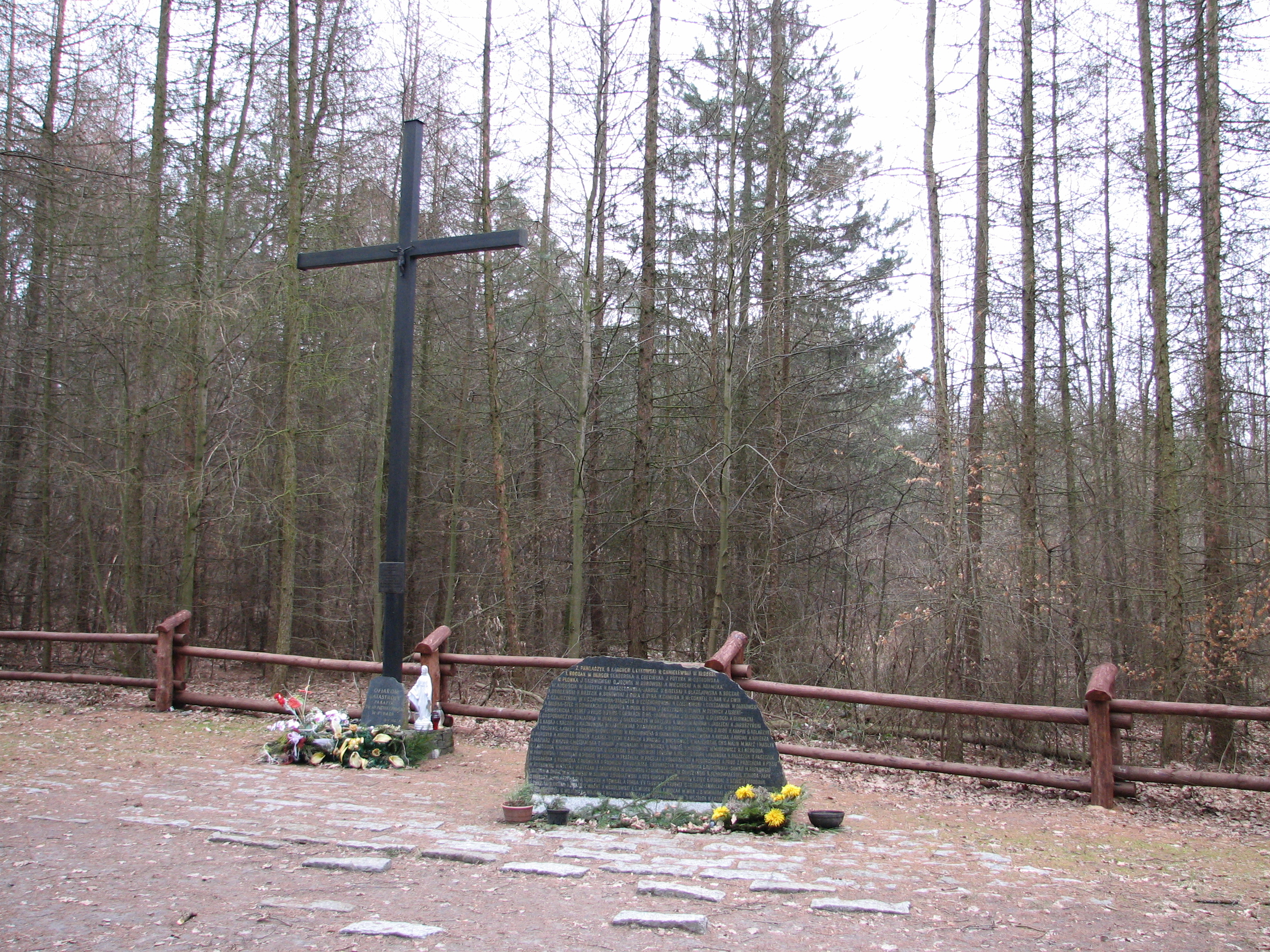 Miejsce katastrofy samolotu Ił-62M SP-LBG "Tadeusz Kościuszko" zaistniałej 9 maja 1987 roku. Warszawa, Las Kabacki al. Załogi Samolotu Kościuszko